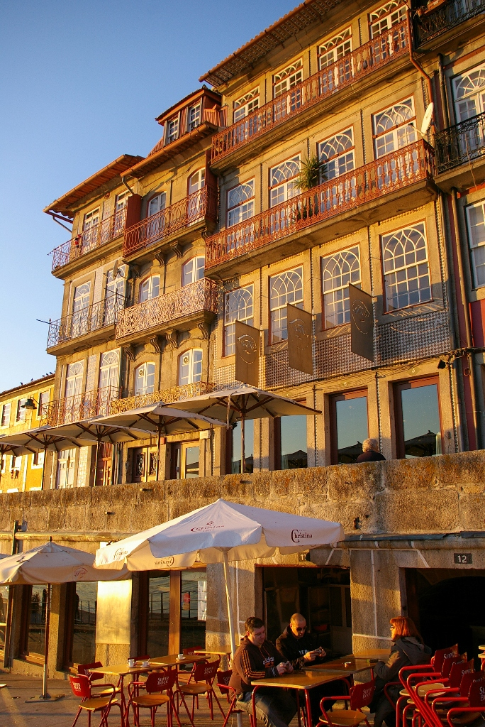 Restaurant "D. Tonho" in Porto, Portugal